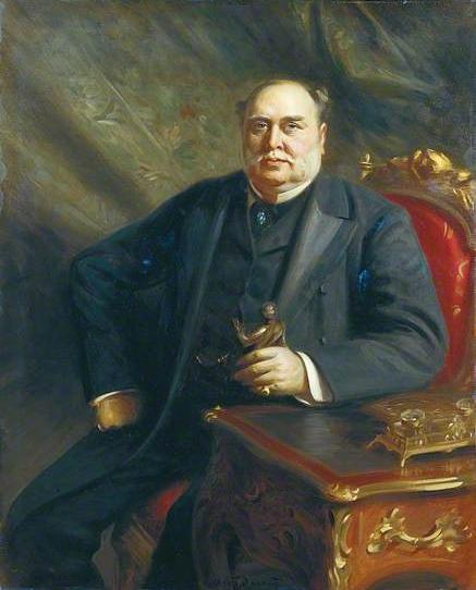 Portrait peint représentant John E. A. Murray Scott (1847-1912), premier conservateur de la Wallace Collection. Auteur du tableau : Herman Herkomer (1863–1935). Localisation : The Wallace Collection.